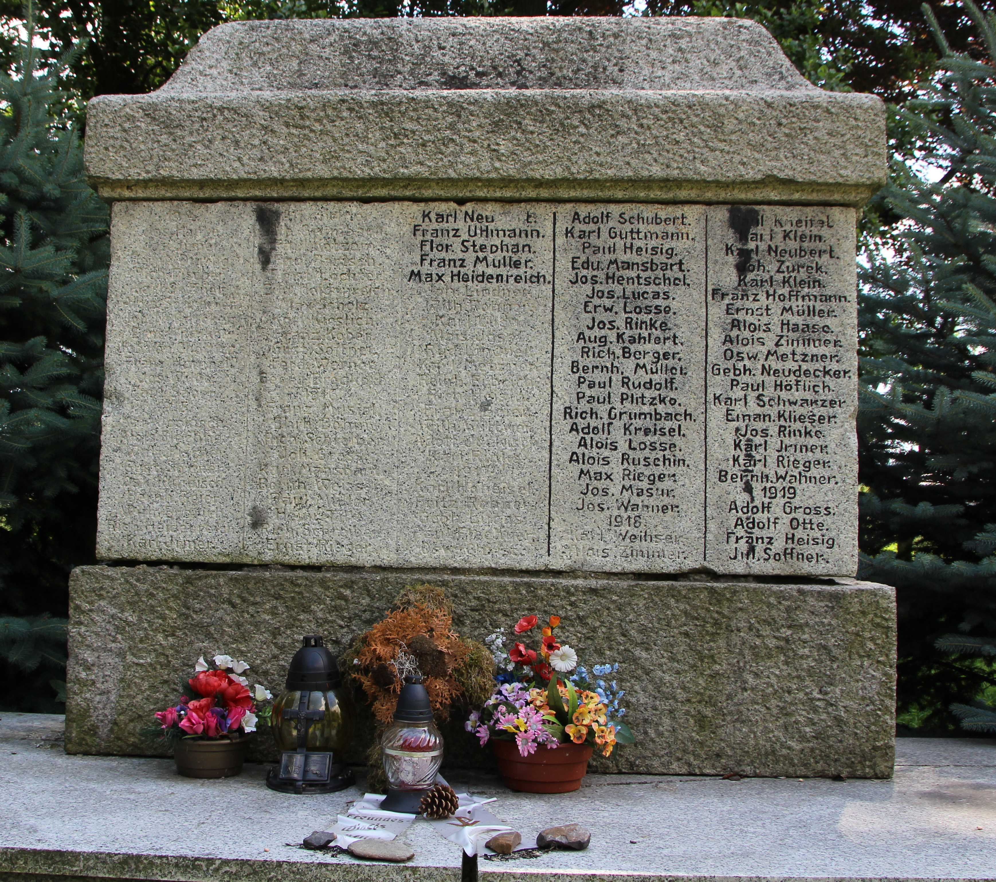 Łąka Prudnicka -wieś w Polsce w województwie opolskim, w powiecie prudnickim w gminie Prudnik.